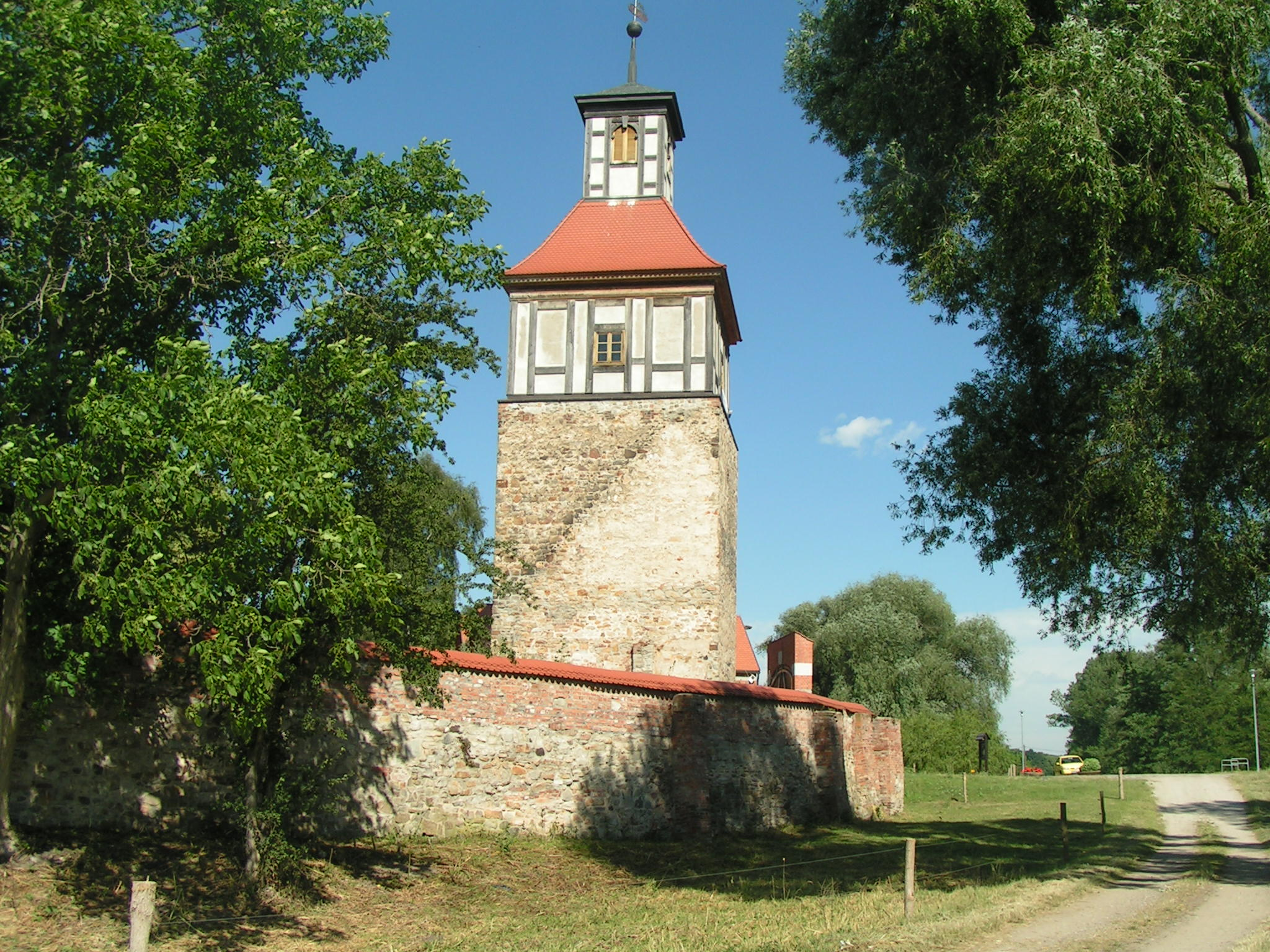 Burgturm in Walternienburg